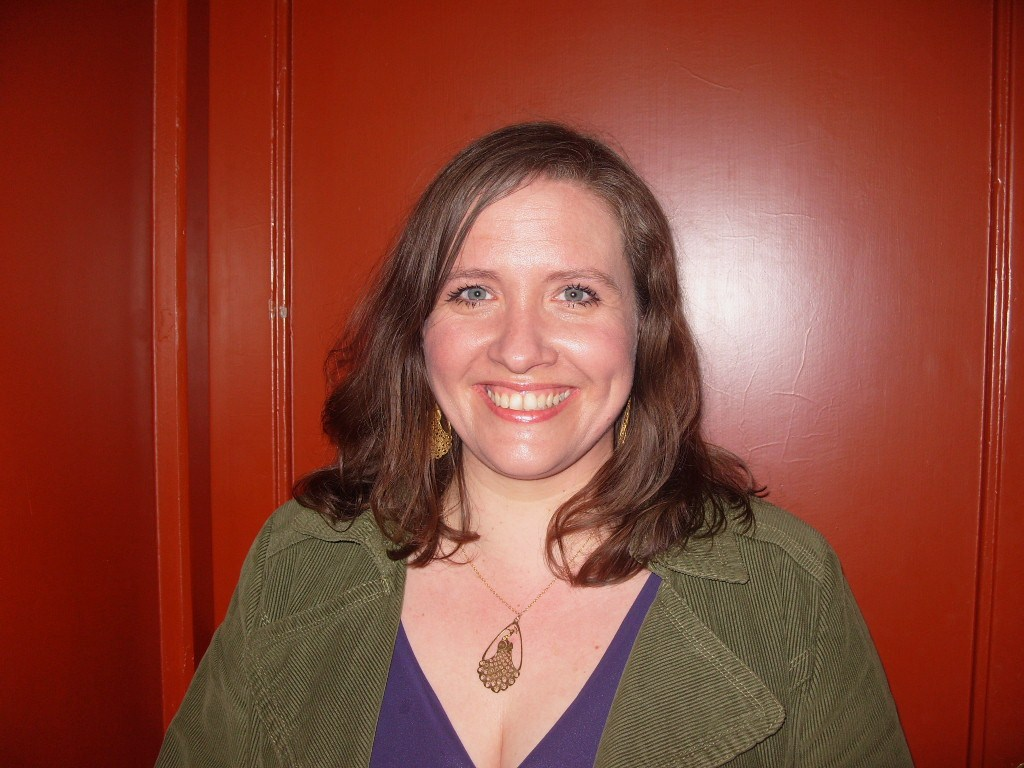 Nana Spier während der Ohrkanus Verleihung 2010 im Babylon Kino in Berlin